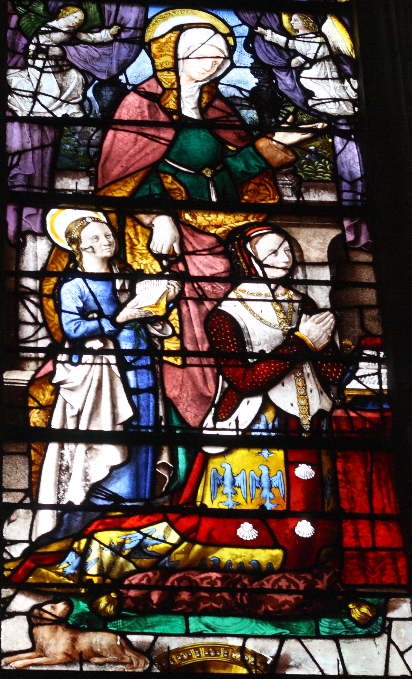 Ausschnitt des Bleiglasfensters Nr. 5 (16. Jahrhundert) in der katholischen Pfarrkirche Saint-Martin (Collégiale Saint-Martin) in Montmorency, Darstellung: Anne de Montmorency mit Tochter und der hl. Anna, Karton: Gauthier de Campes, Ausführung: Jean Chastelain (siehe: Dominique Foussard, Charles Huet, Mathieu Lours: Églises du Val-d'Oise. Pays de France, Vallée de Montmorency, Société d'Histoire et d'Archéologie de Gonesse et du Pays de France, 2. Auflage, Gonesse 2011, ISBN 9782953155426)